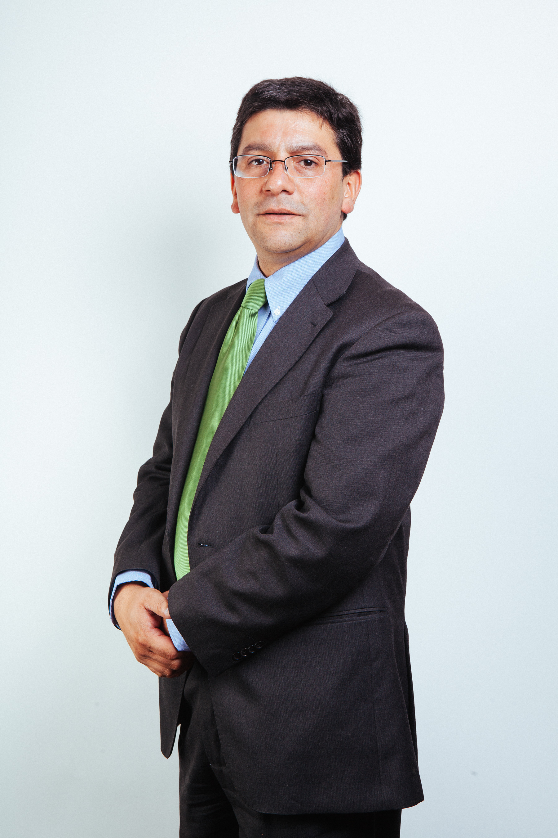 Ministro de Estado del segundo gobierno de Michelle Bachelet (2014-2018)